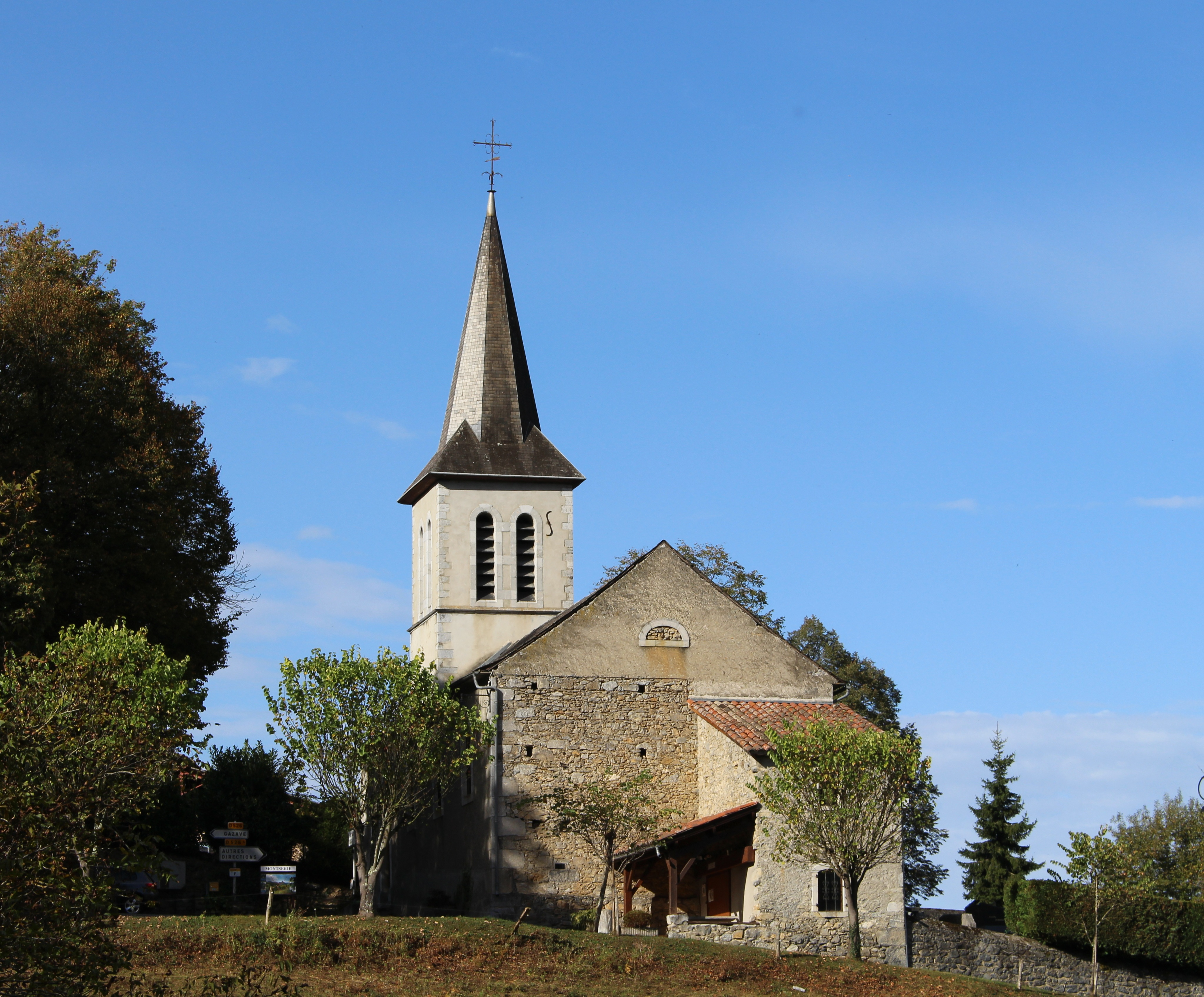 Église Saint-Pierre-et-Saint-Paul de Montsérié (Hautes-Pyrénées)